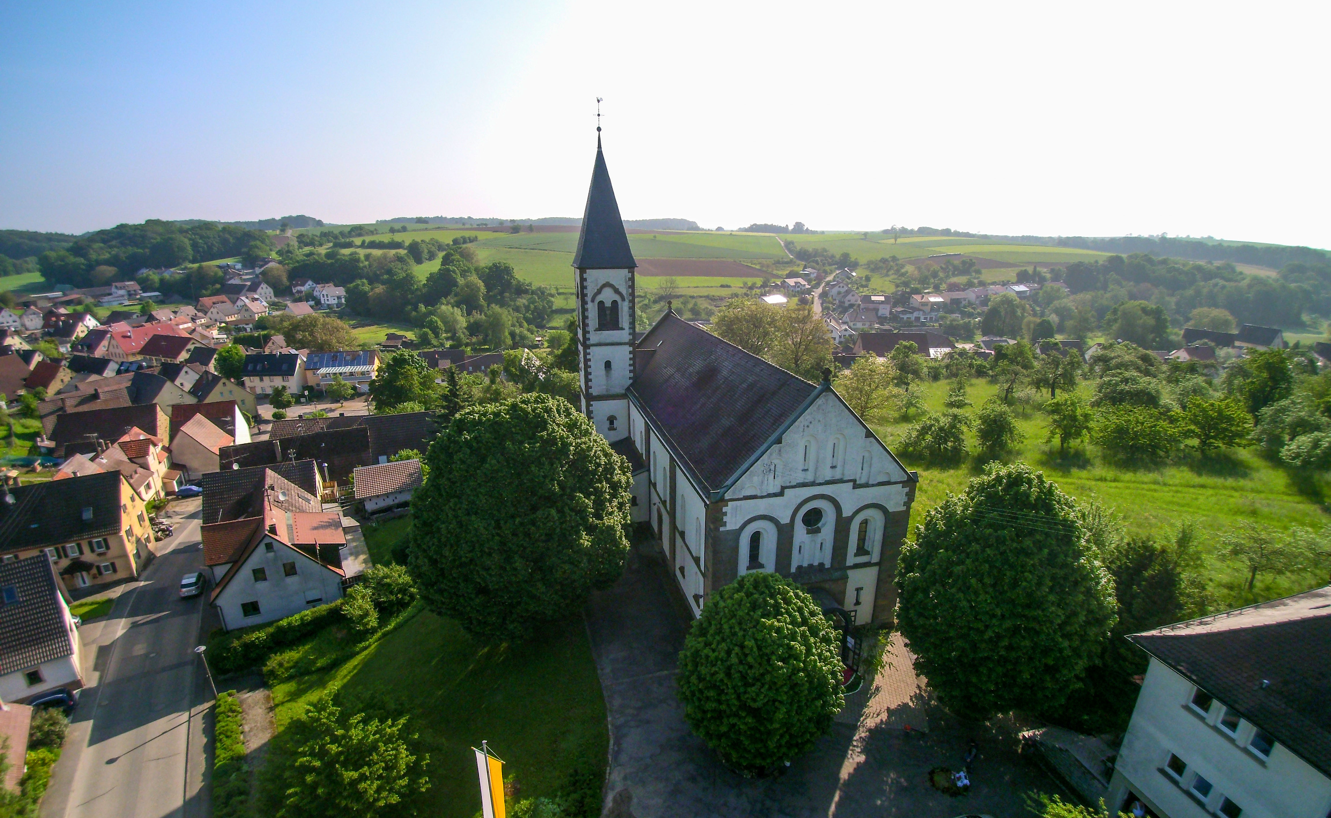 Pfarrkirche St. Jakobus in Gundelsheim-Tiefenbach